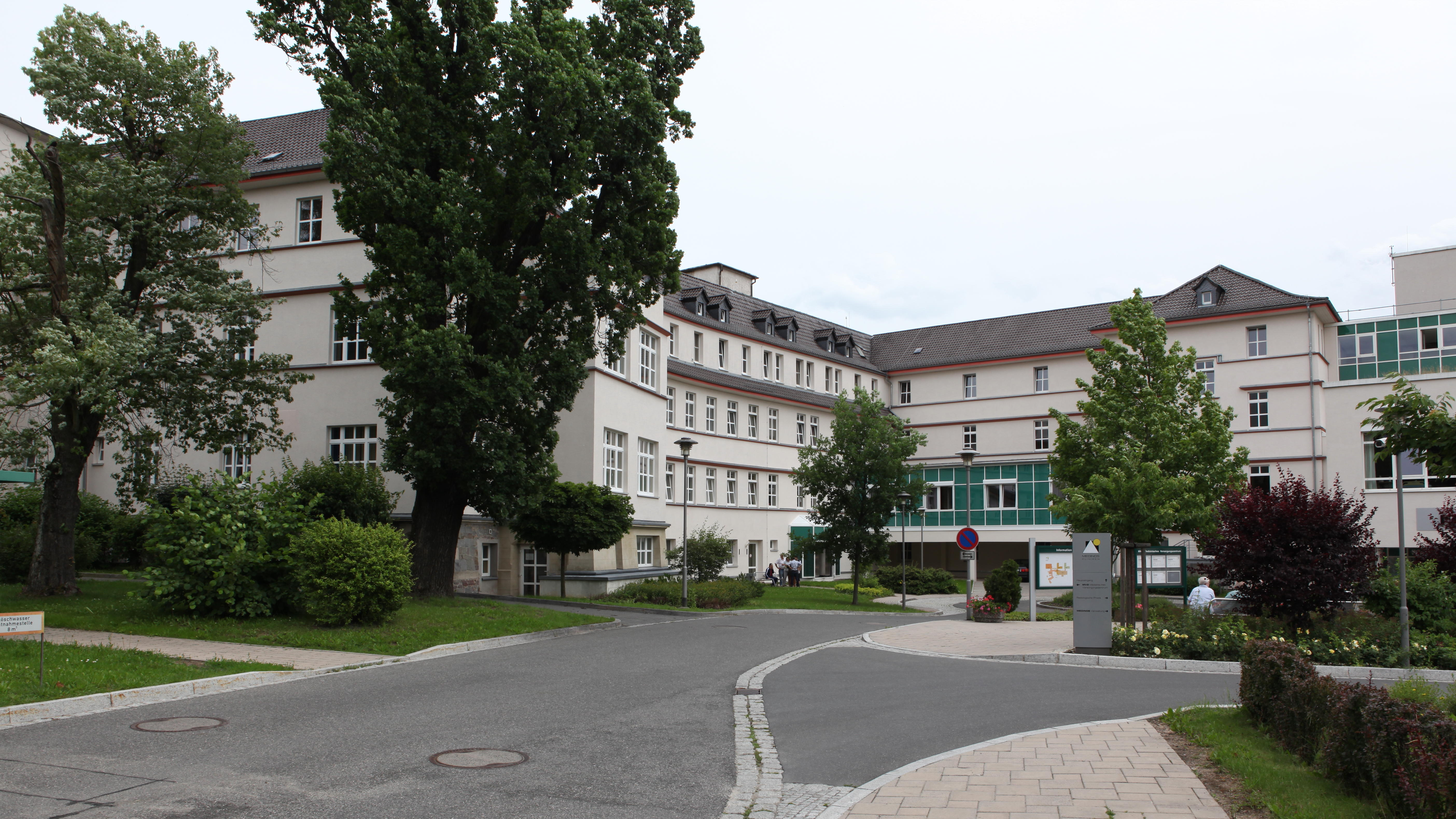 Krankenhaus in Sonneberg, Thüringen